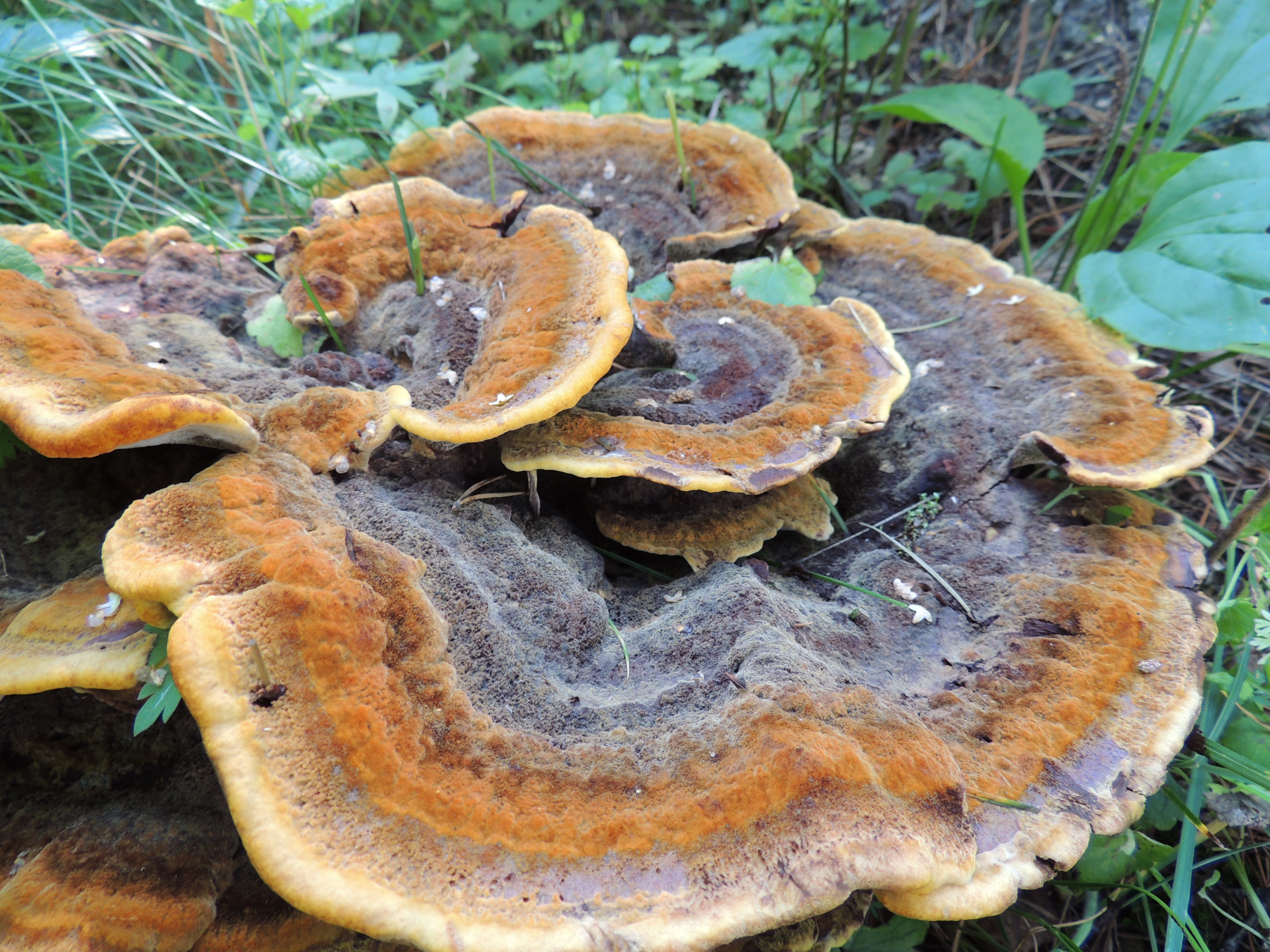 Phaeolus schweinitzii трутовик Швейница